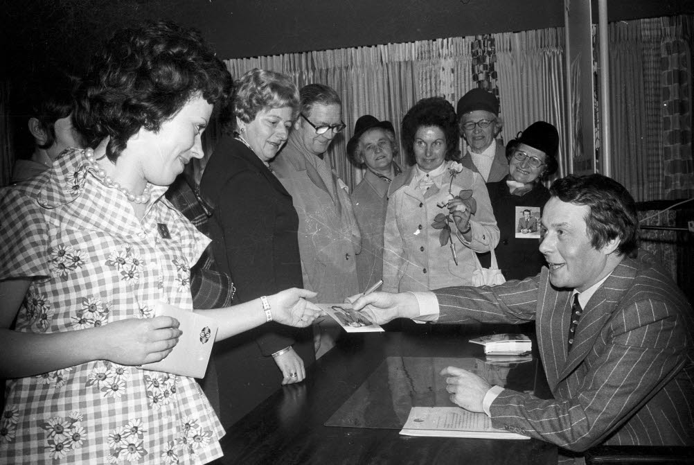 Autogrammstunde anlässlich der Neueröffnung des Einkaufszentrums Weipert in der Holstenstraße.